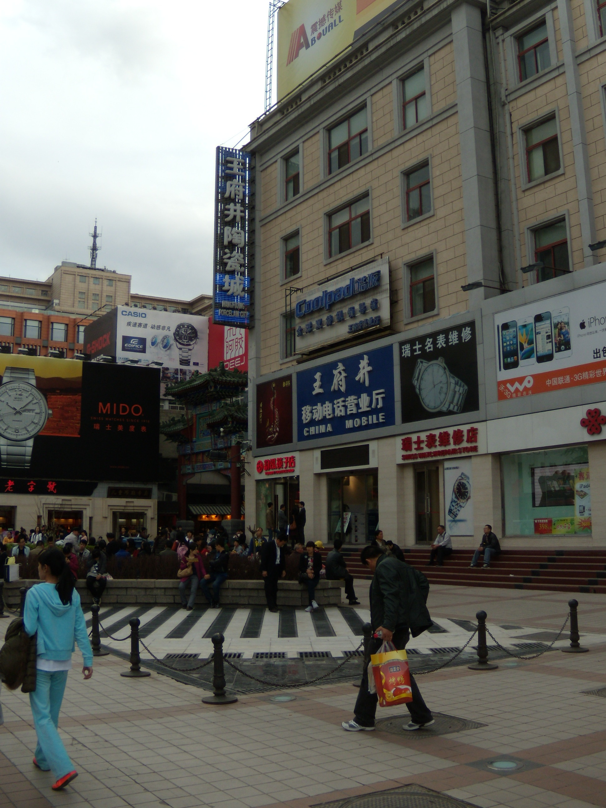 好友广场，位于好友世界商场东侧